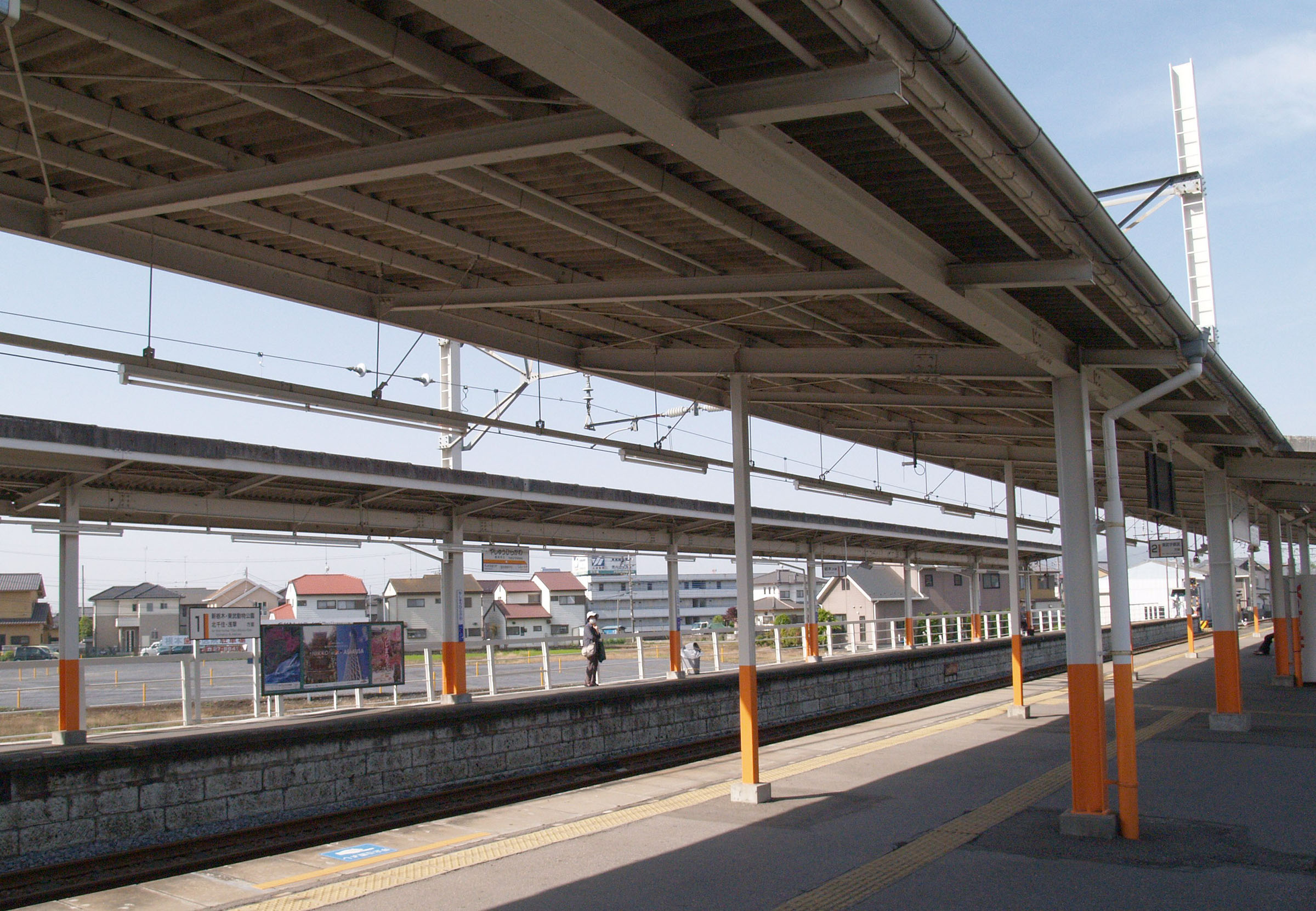 野州平川駅ホーム